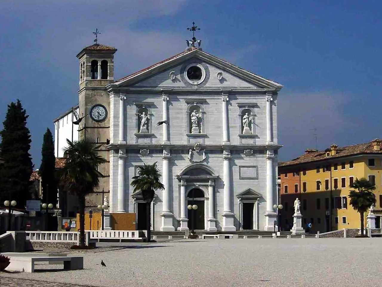 Palmanova. Il Duomo.